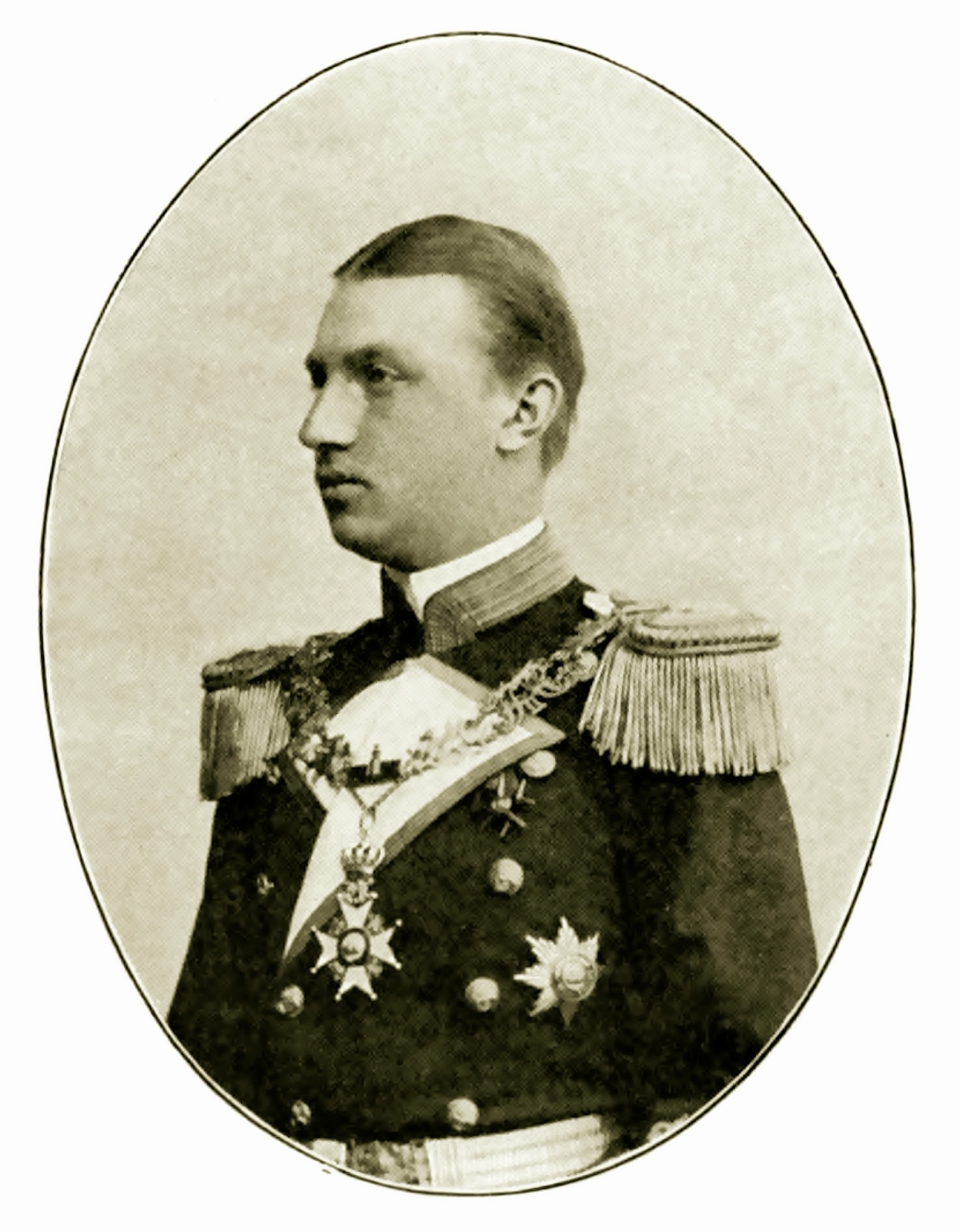 Leutnant zur See Friedrich Wilhelm zu Mecklenburg 1893/94